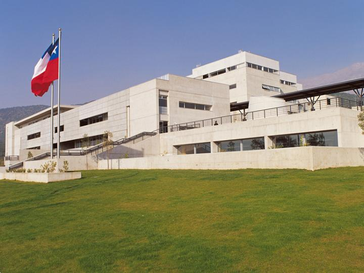 Universidad del Desarrollo campus san Carlos de apoquindo